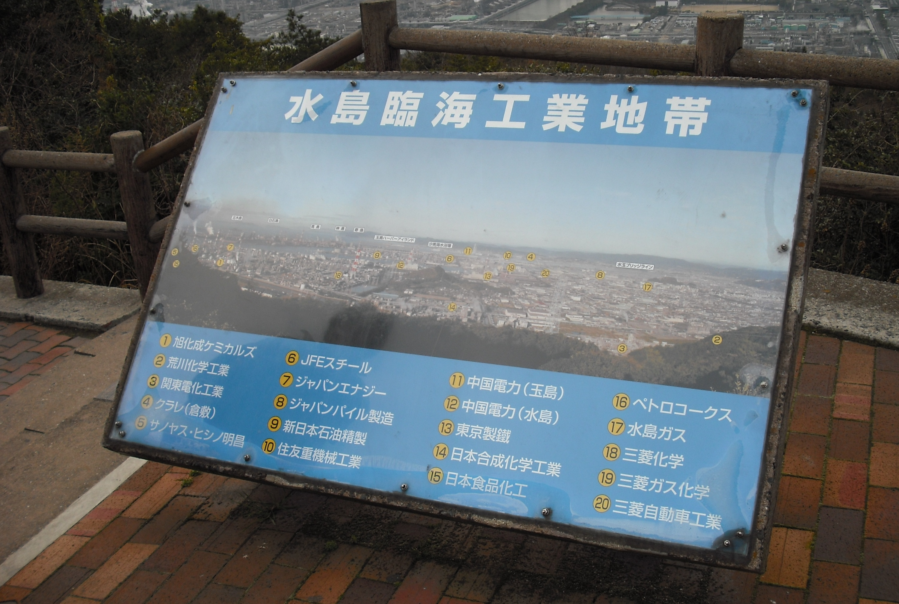 自宅近くの公園に提示の案内標識